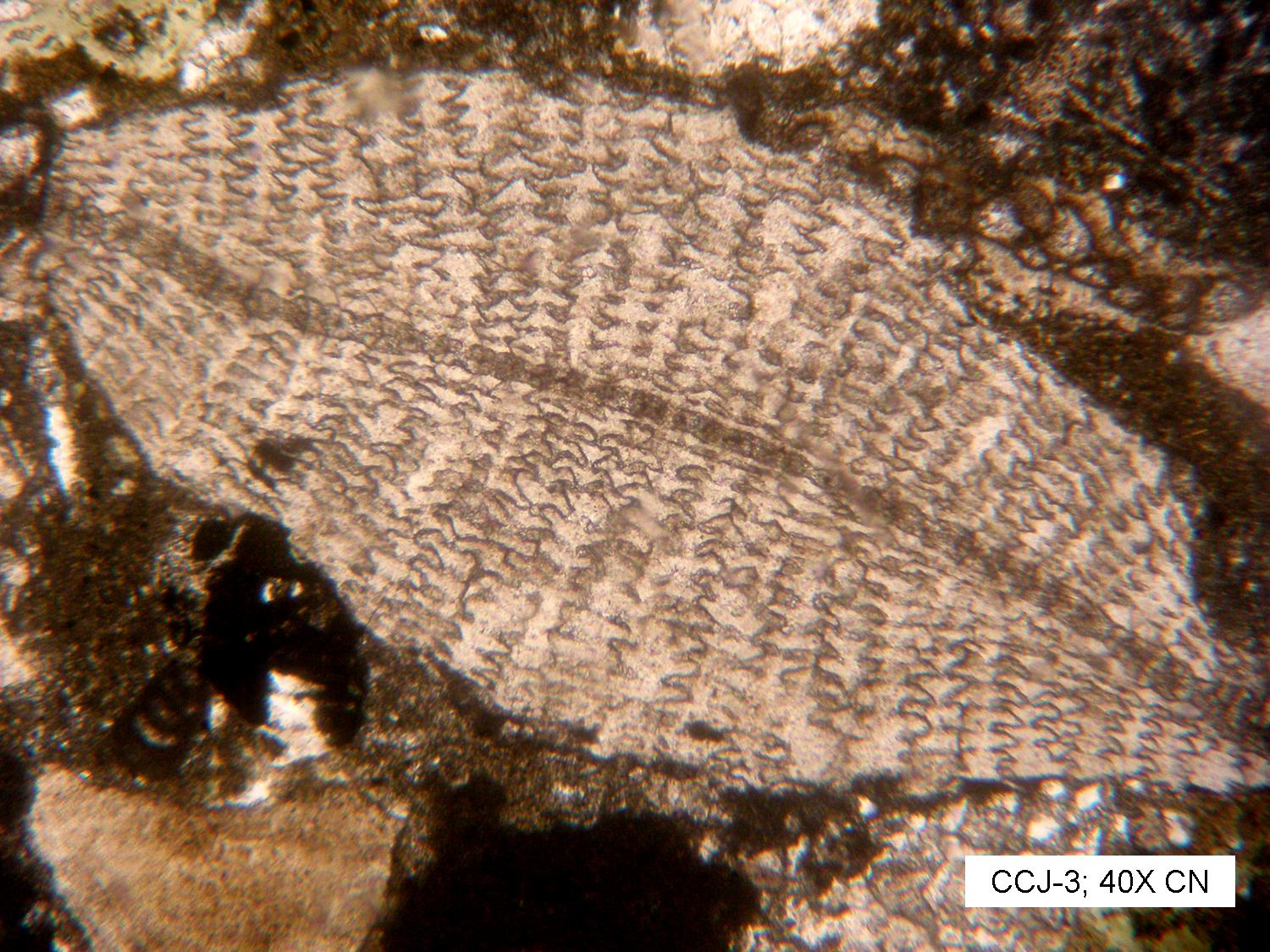 Fósil característico de las formaciones producto del impacto meteorítico